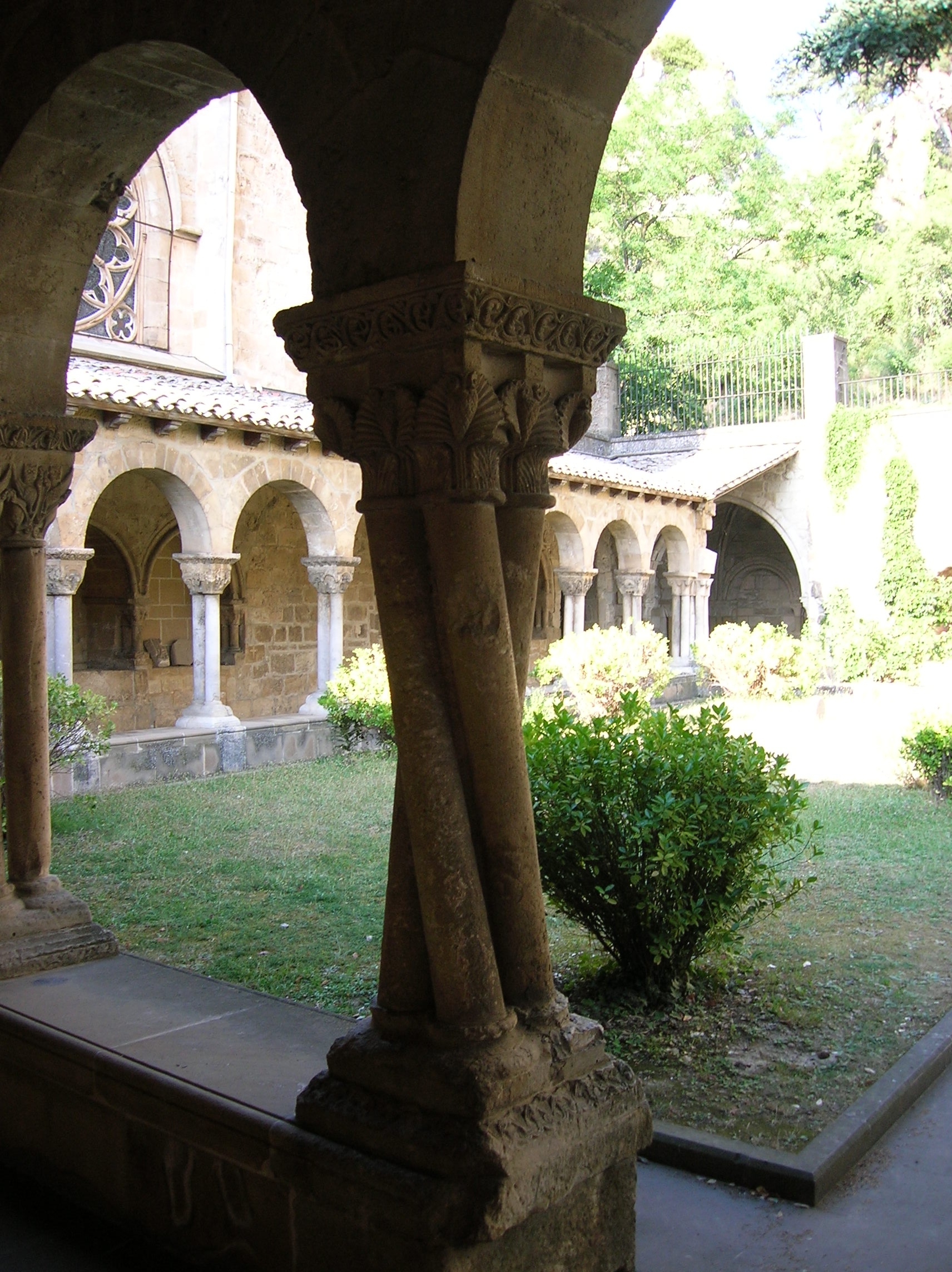 Image: Estella (Espagne, Navarre) : cloître de l'église San Pedro Auteur : DanielT, photo prise moi-même, juillet 2006